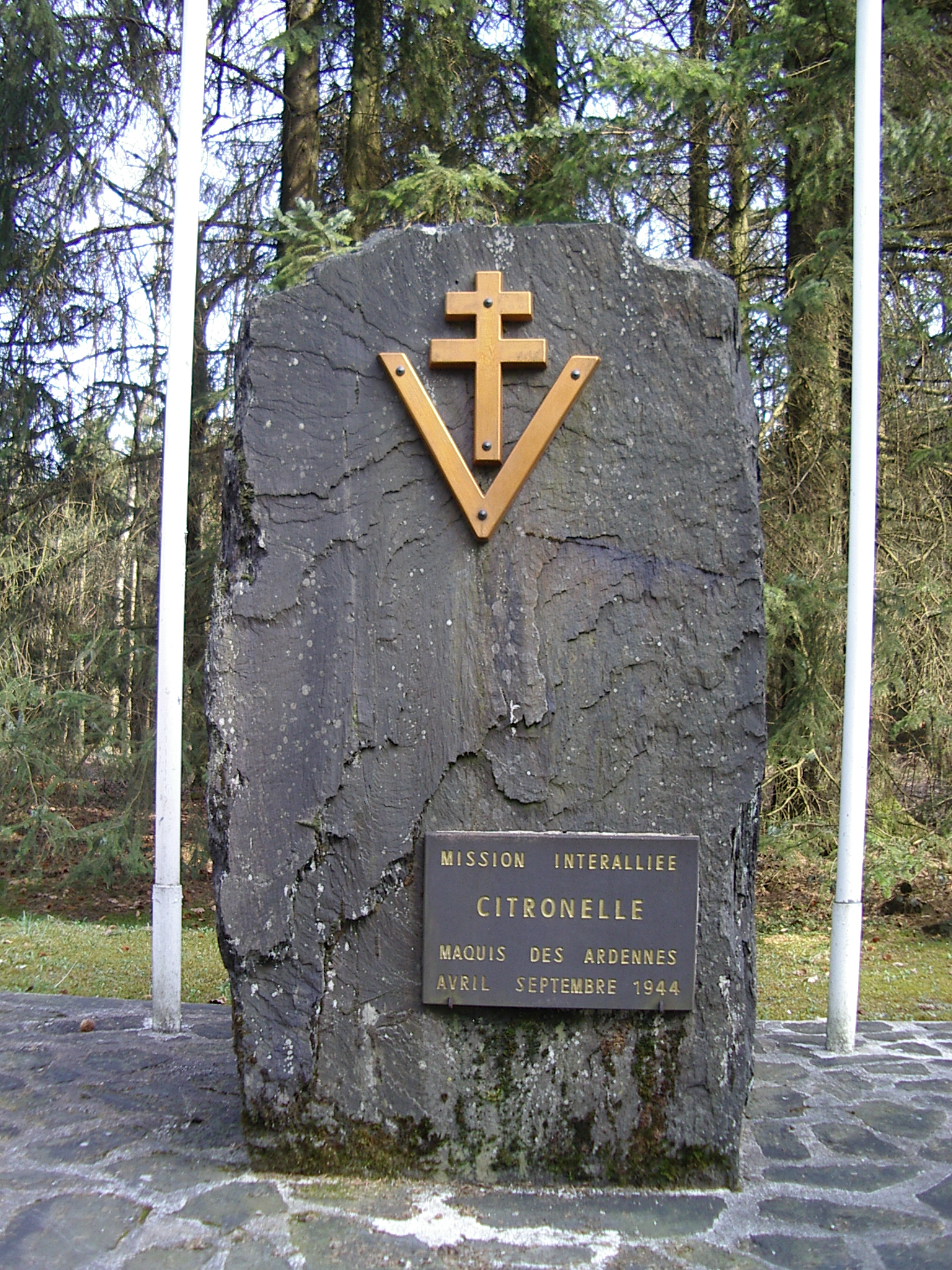 Mémorial Mission Citronelle Localisation - 08800 - Monthermé